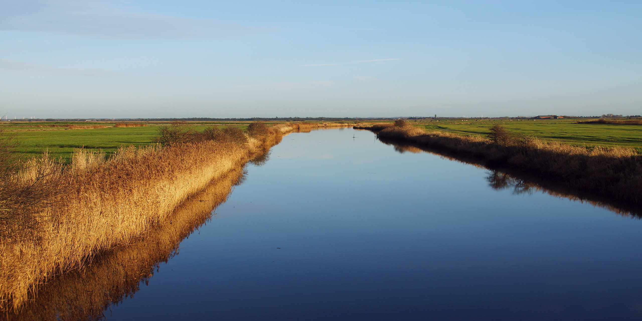 Ballum Brede Å in der Breder Au im späten Nachmittagslicht vor Ballum Sluse Schleuse - Dänemark - Foto Wolfgang Pehlemann DSC04710